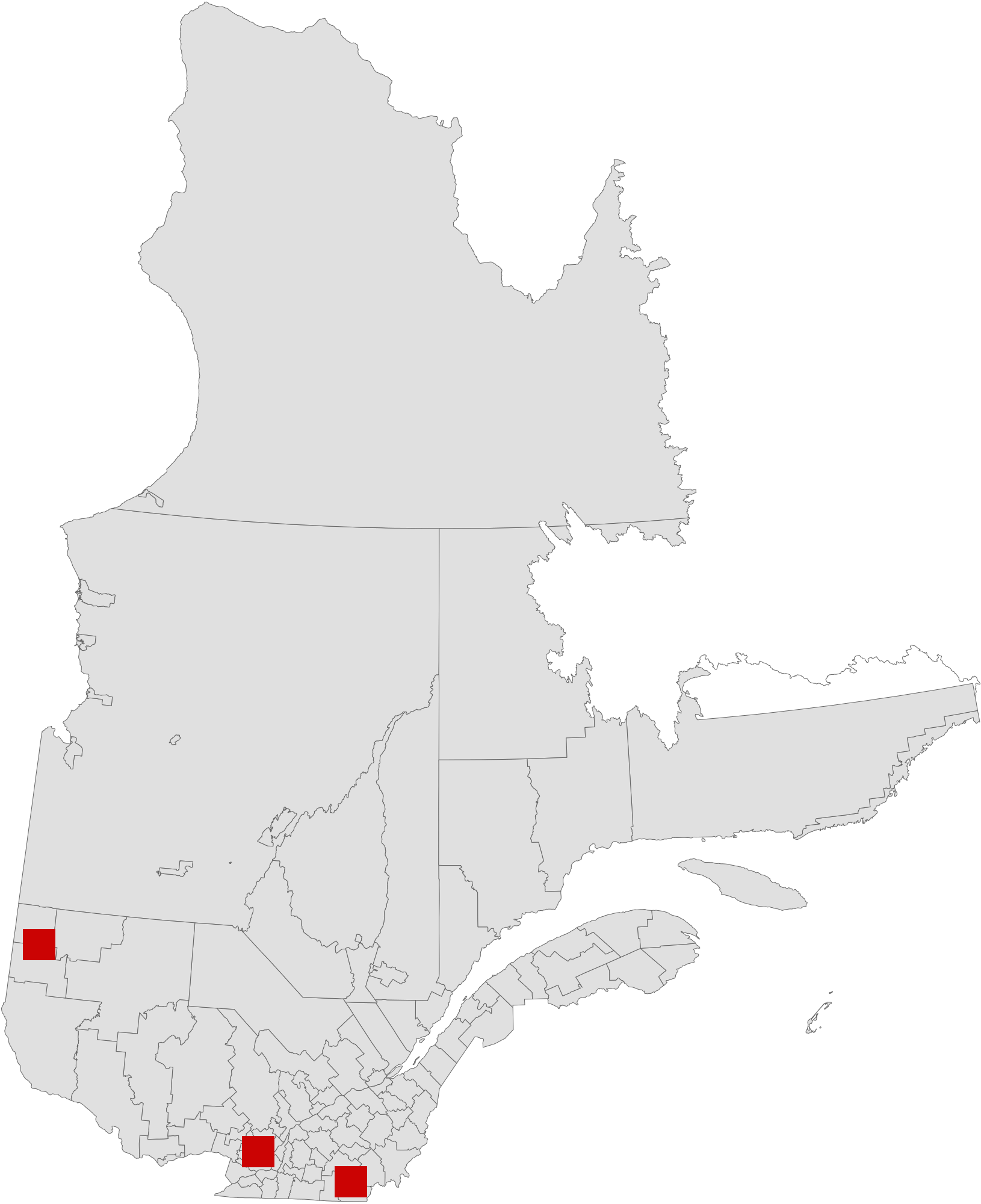 Répartition régionale du membership de la FEUQ